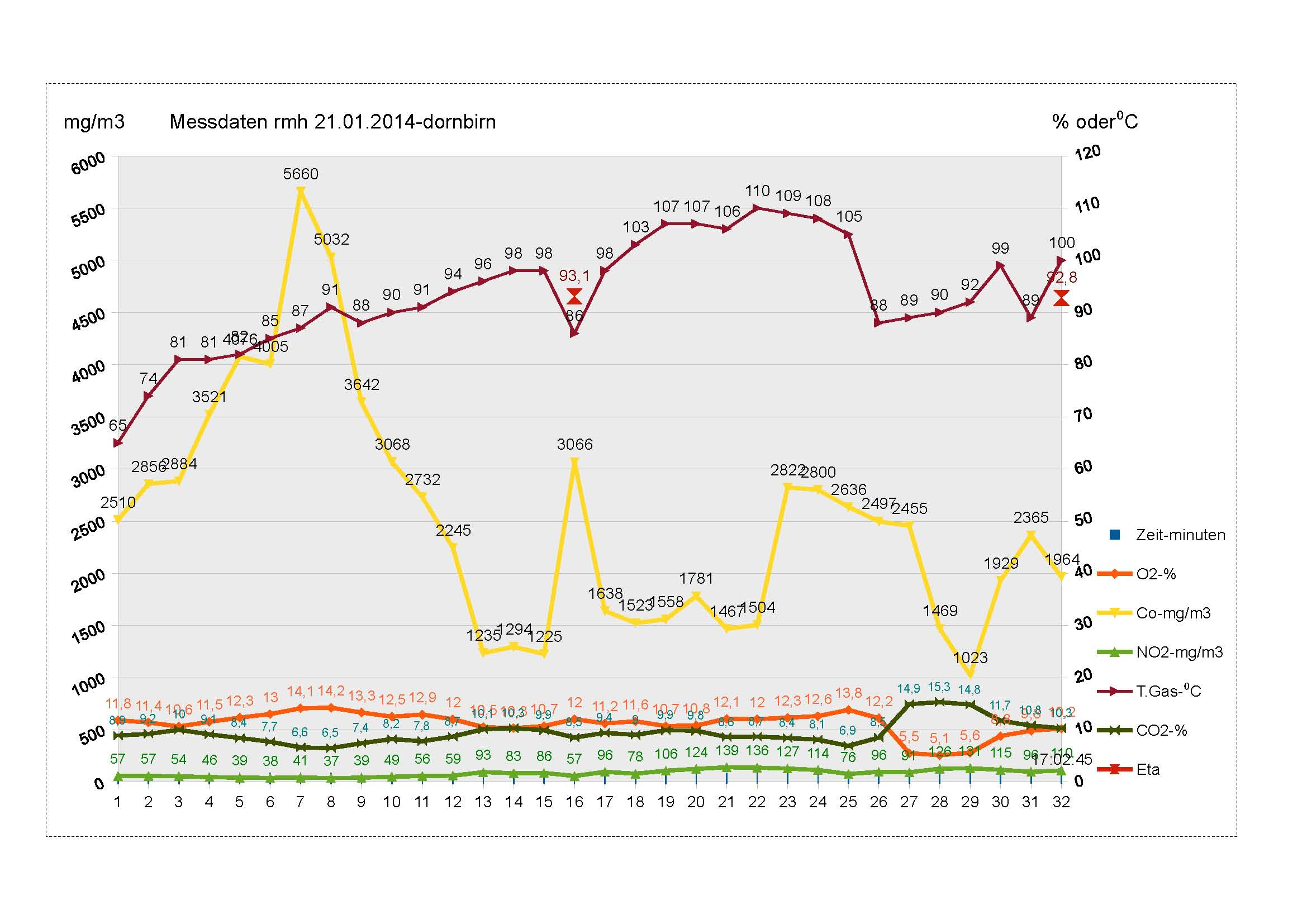 vorgeschriebene Mess-Datenreihe über 15Minuten